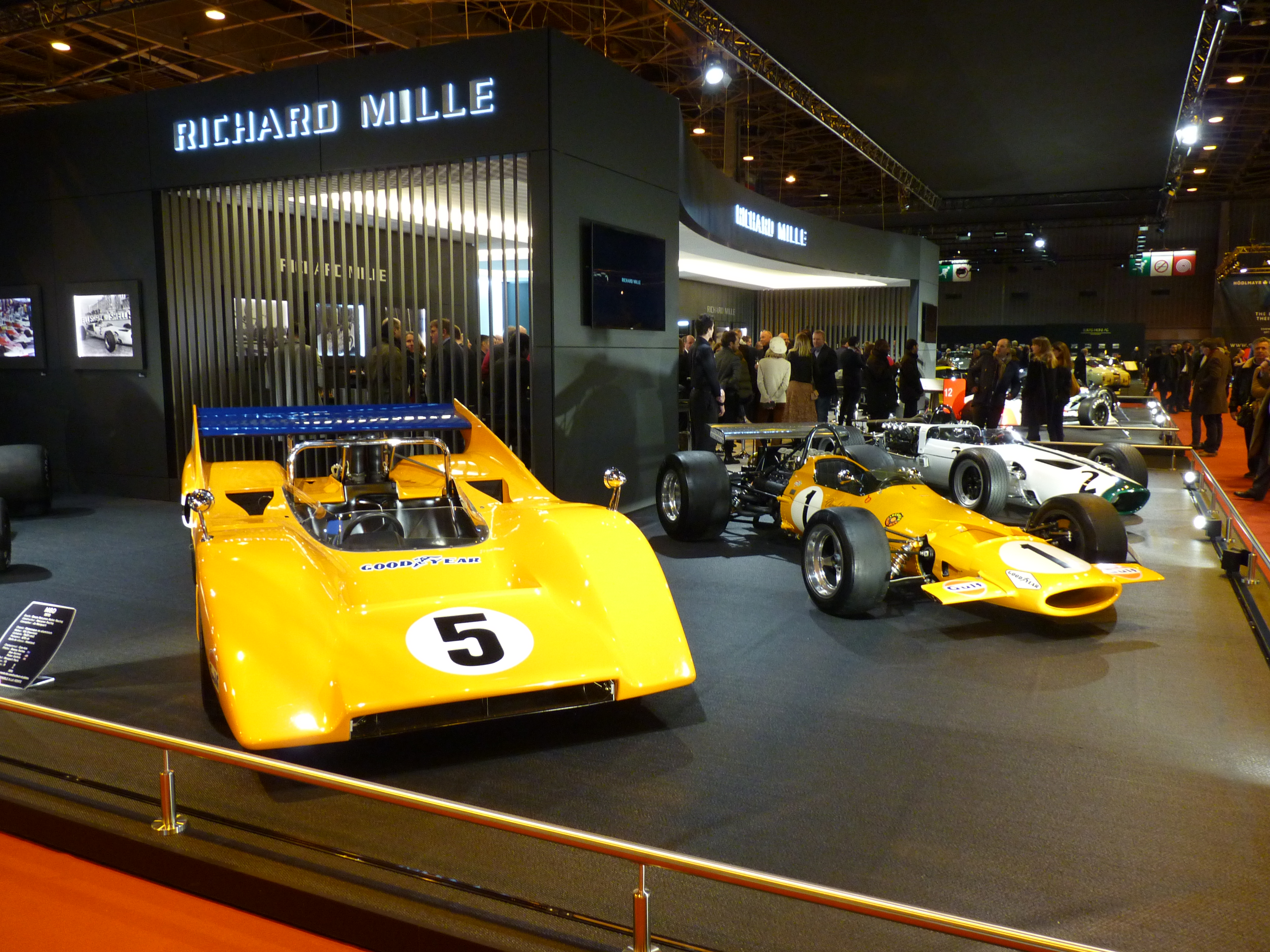 Exposition McLaren Rétromobile 2018